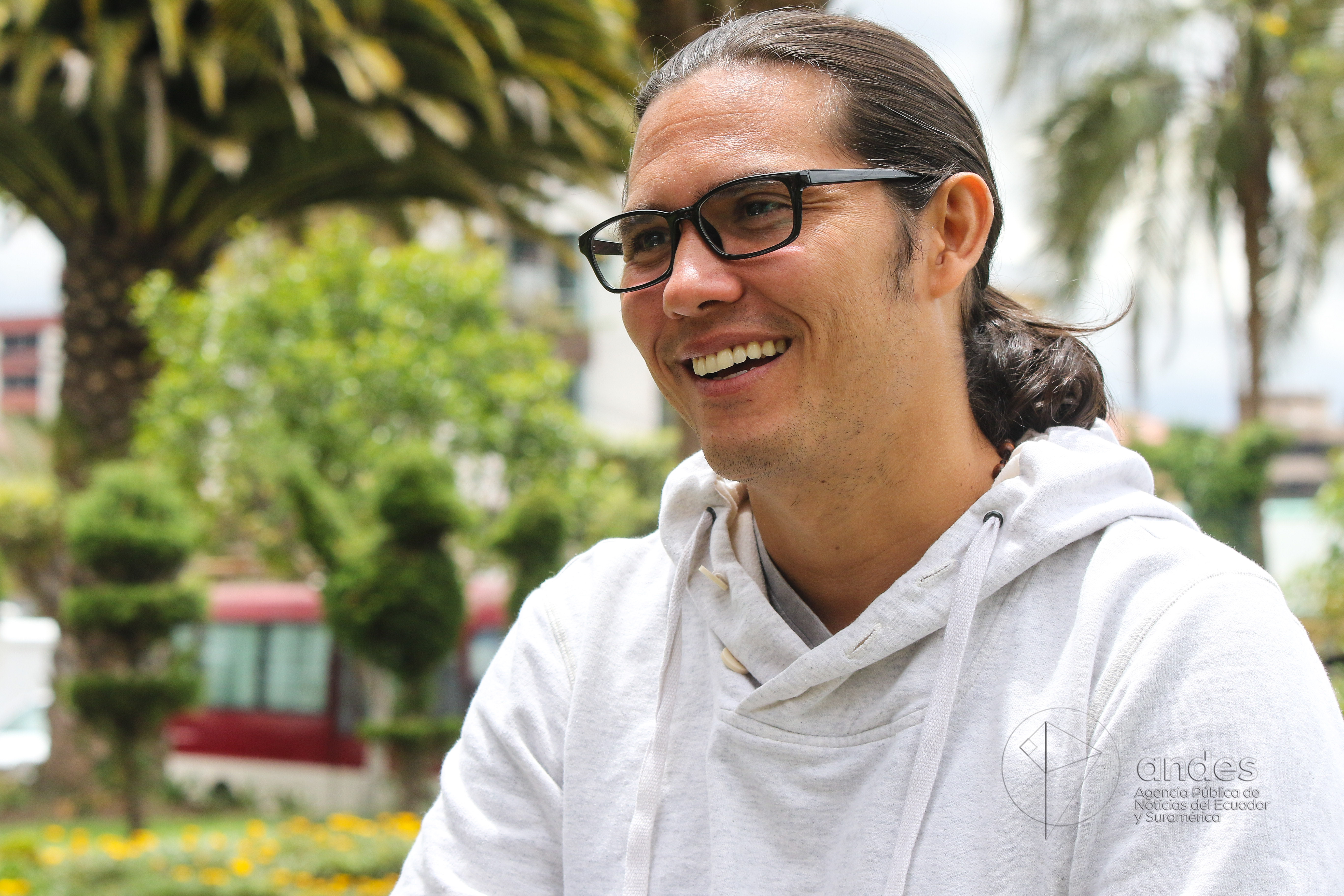 Juan Pablo Asanza en 2017